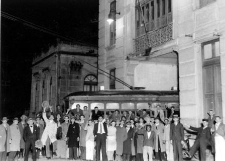 Foto da última viagem do bonde de Petrópolis em 15 de julho de 1939 doada por José Kopke Froés para o Arquivo do Museu Imperial.